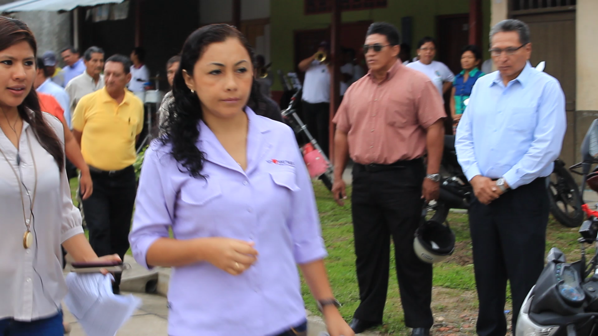 Alcaldesa de Maynas Adela Jiménez, Iquitos 2015.